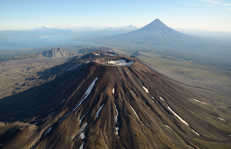 вулкан Крашенинникова, за ним Кроноцкая сопка и Кроноцкое озеро. За Кроноцким озером дымится Кизимен, а еще дальше, на пределе видимости, Ключевская сопка и другие вулканы Ключевской группы.